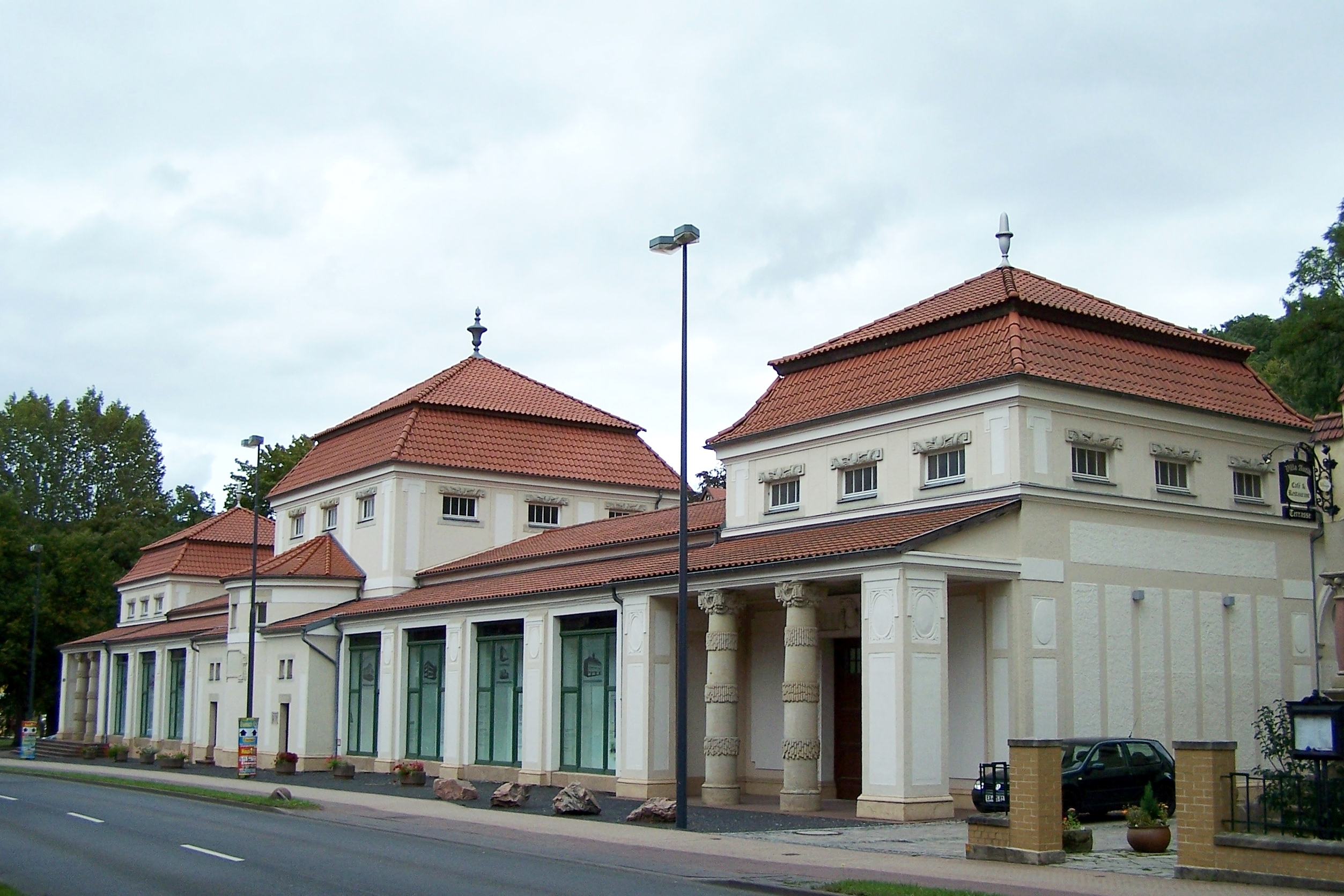 Ansicht von Süden (Wartburgallee)